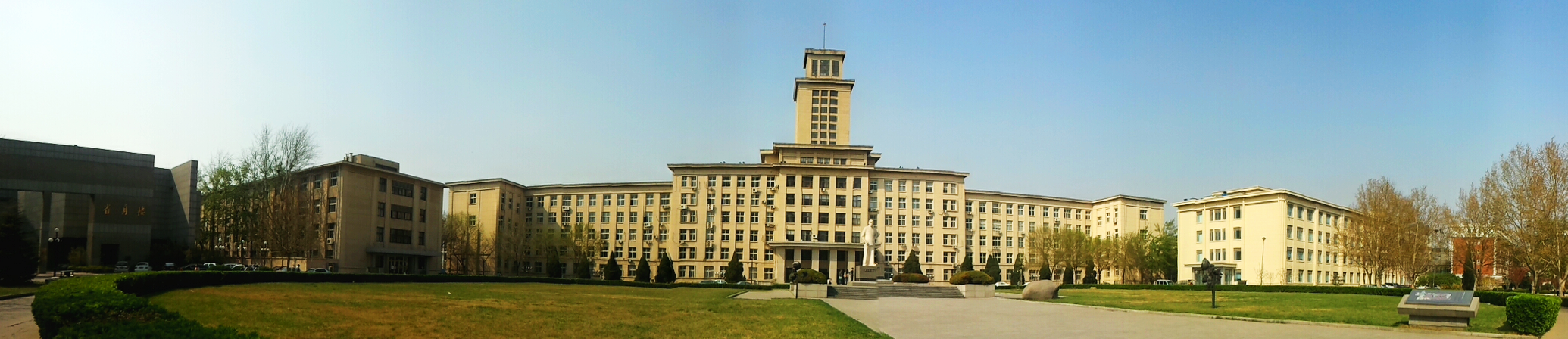 南开大学主楼前广场全景